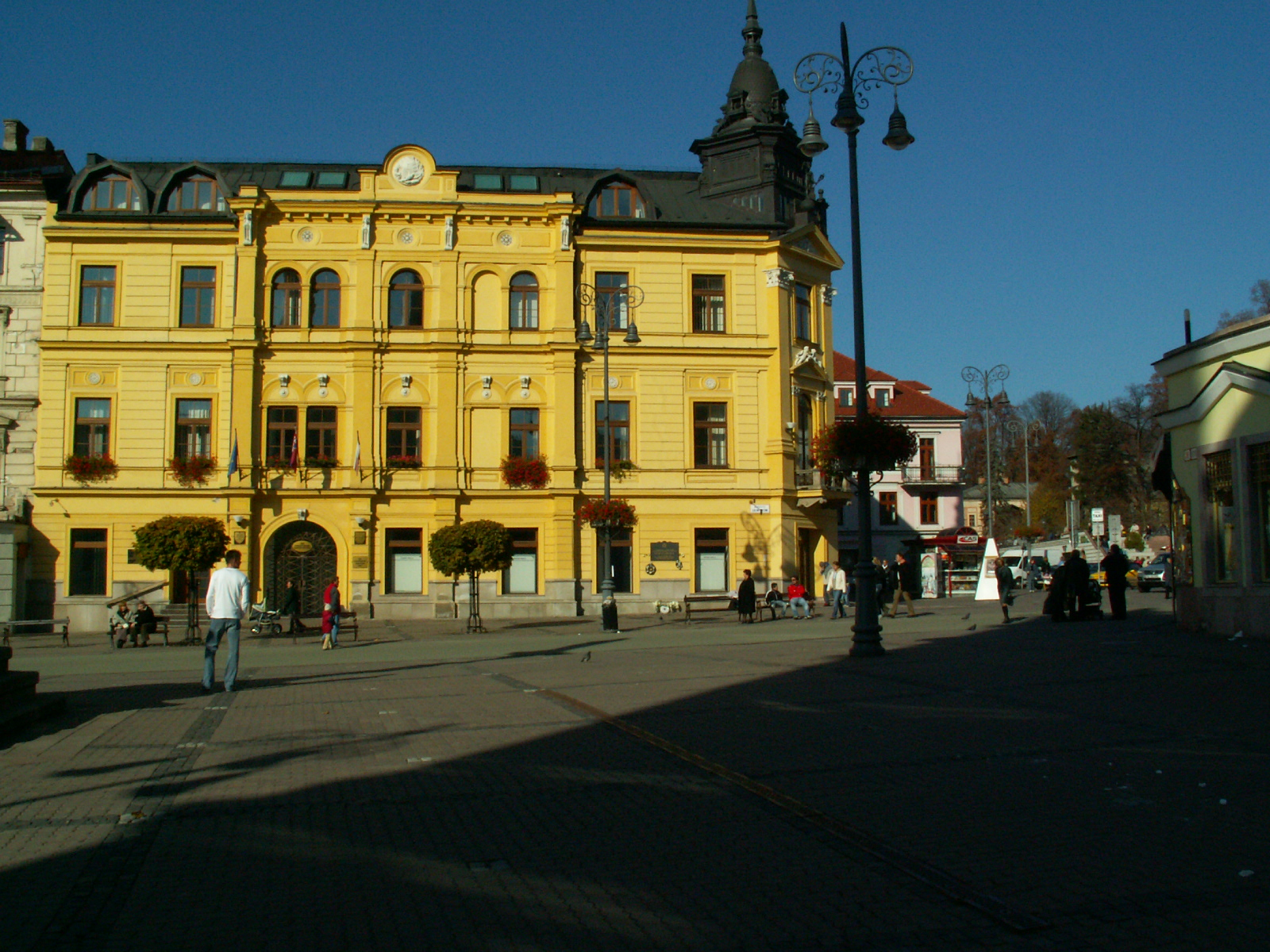 Námestie SNP - úrad BBSK (Ebnerovský dom)